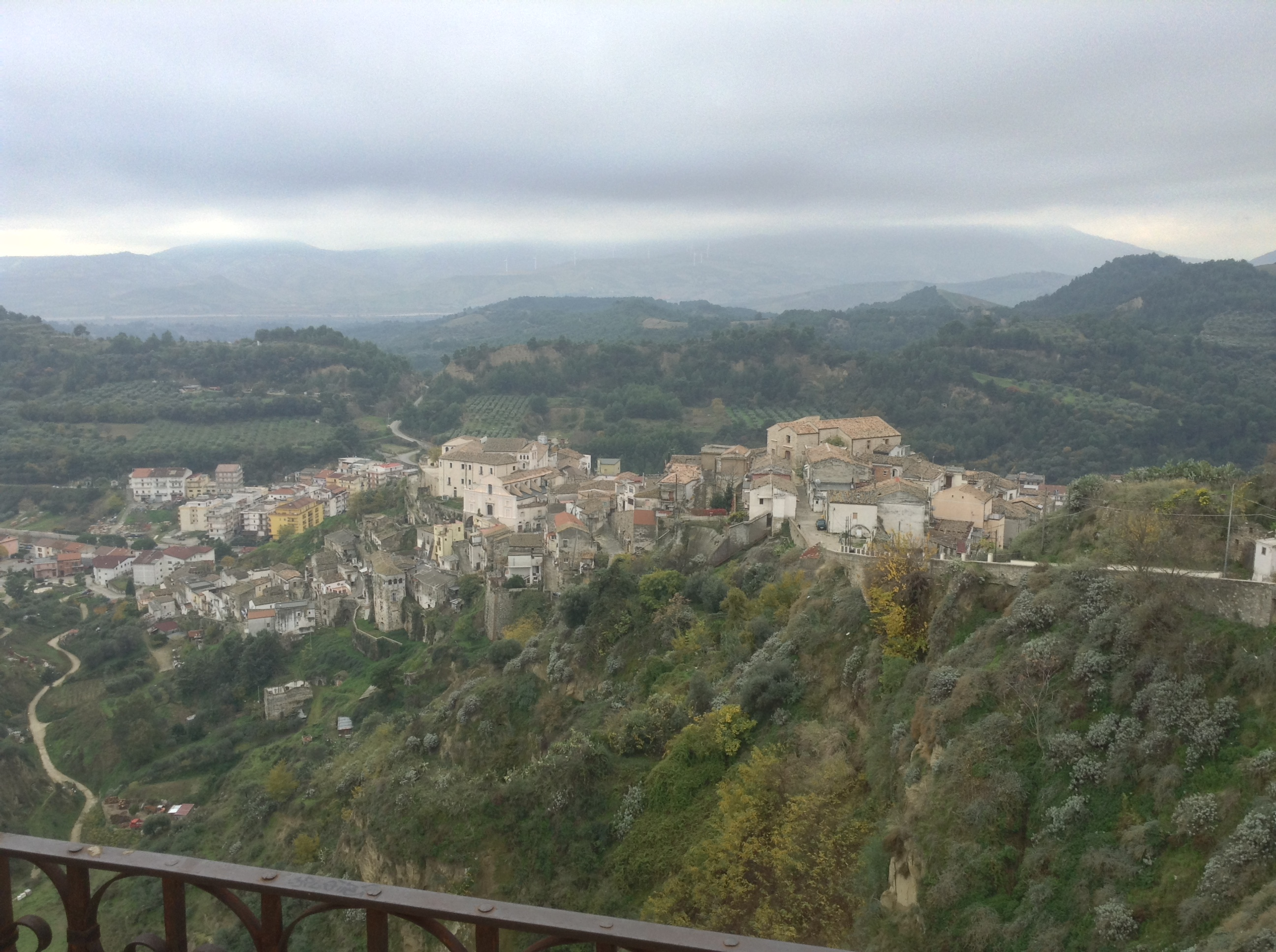 Vista da Rabatana sulla gradinata della rabatana e su Tursi (vecchia)